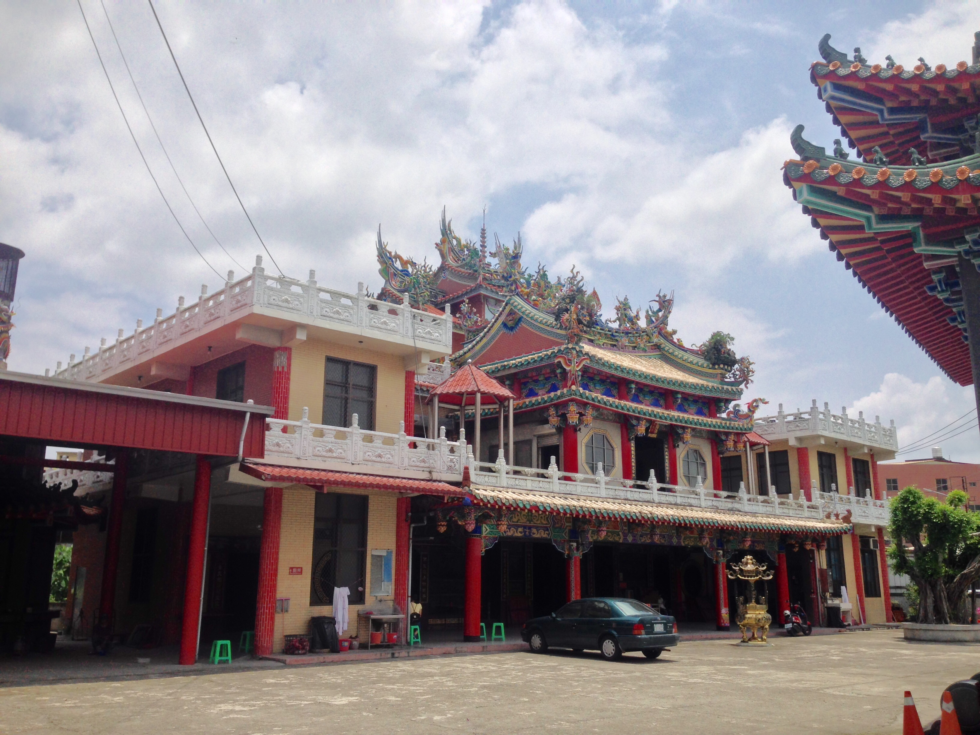 中文（台灣）: 寒林寺近景